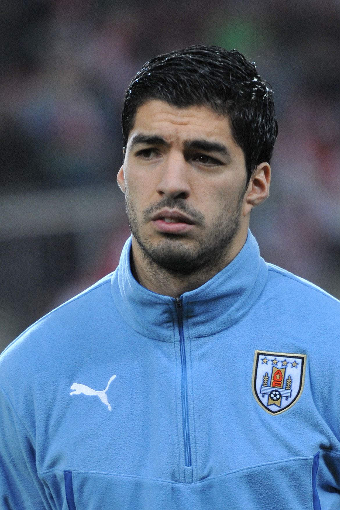 Freundschaftliches Länderspiel Österreich - Uruguay am 5. März 2014 in Klagenfurt: Luis Suárez